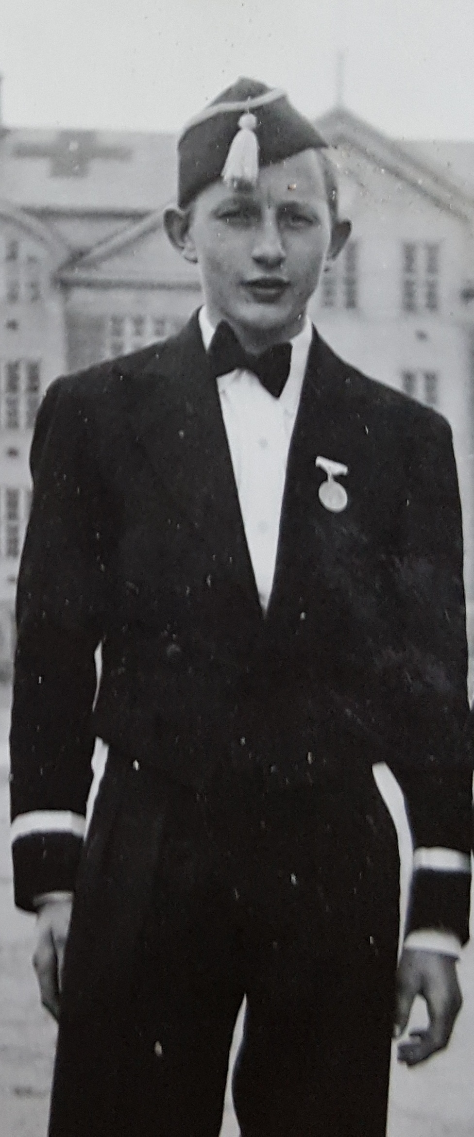 Svein Hauan, klar for divisjonsmusikken